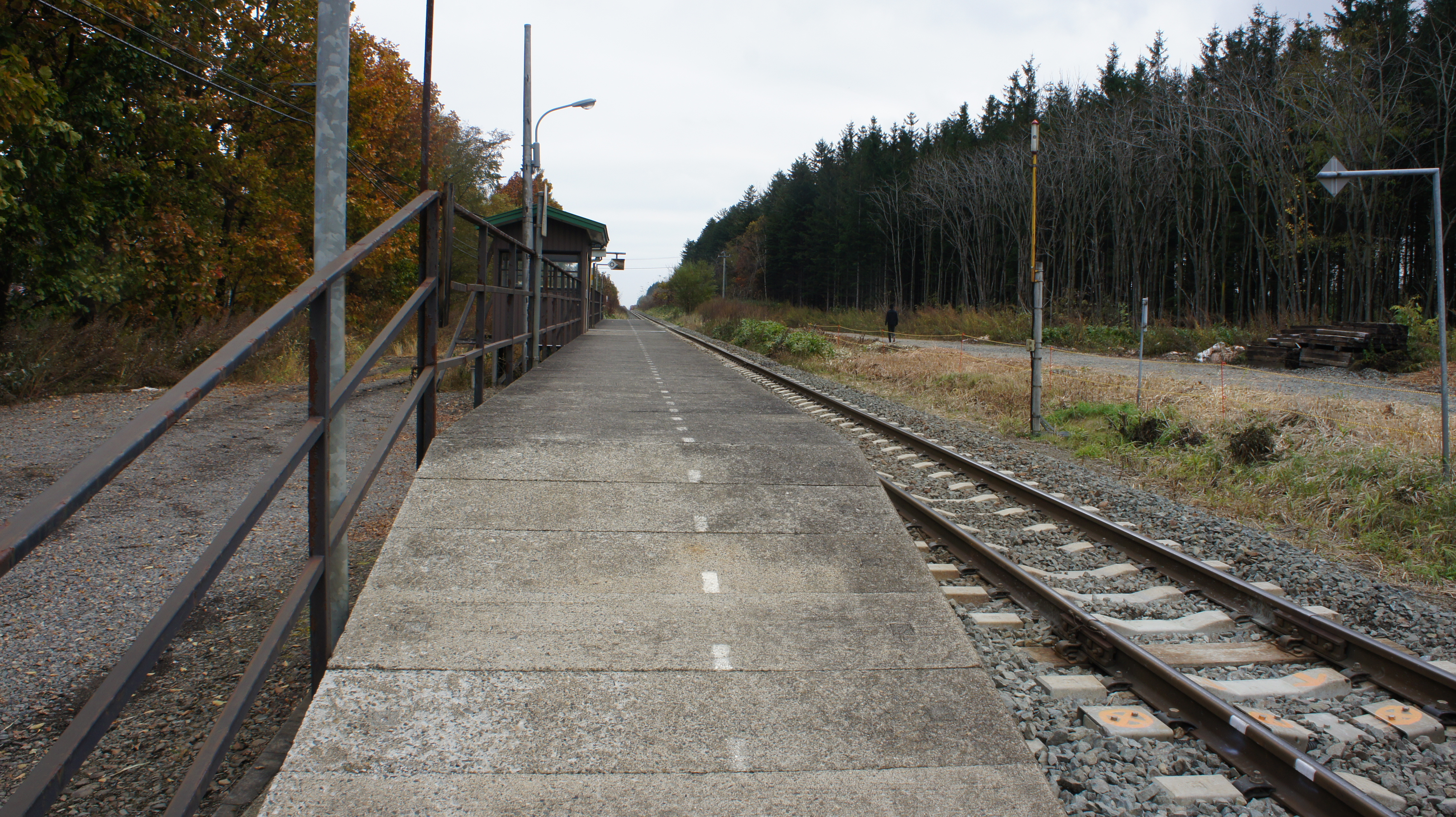 JR根室本線・羽帯駅のホーム Sony NEX-3